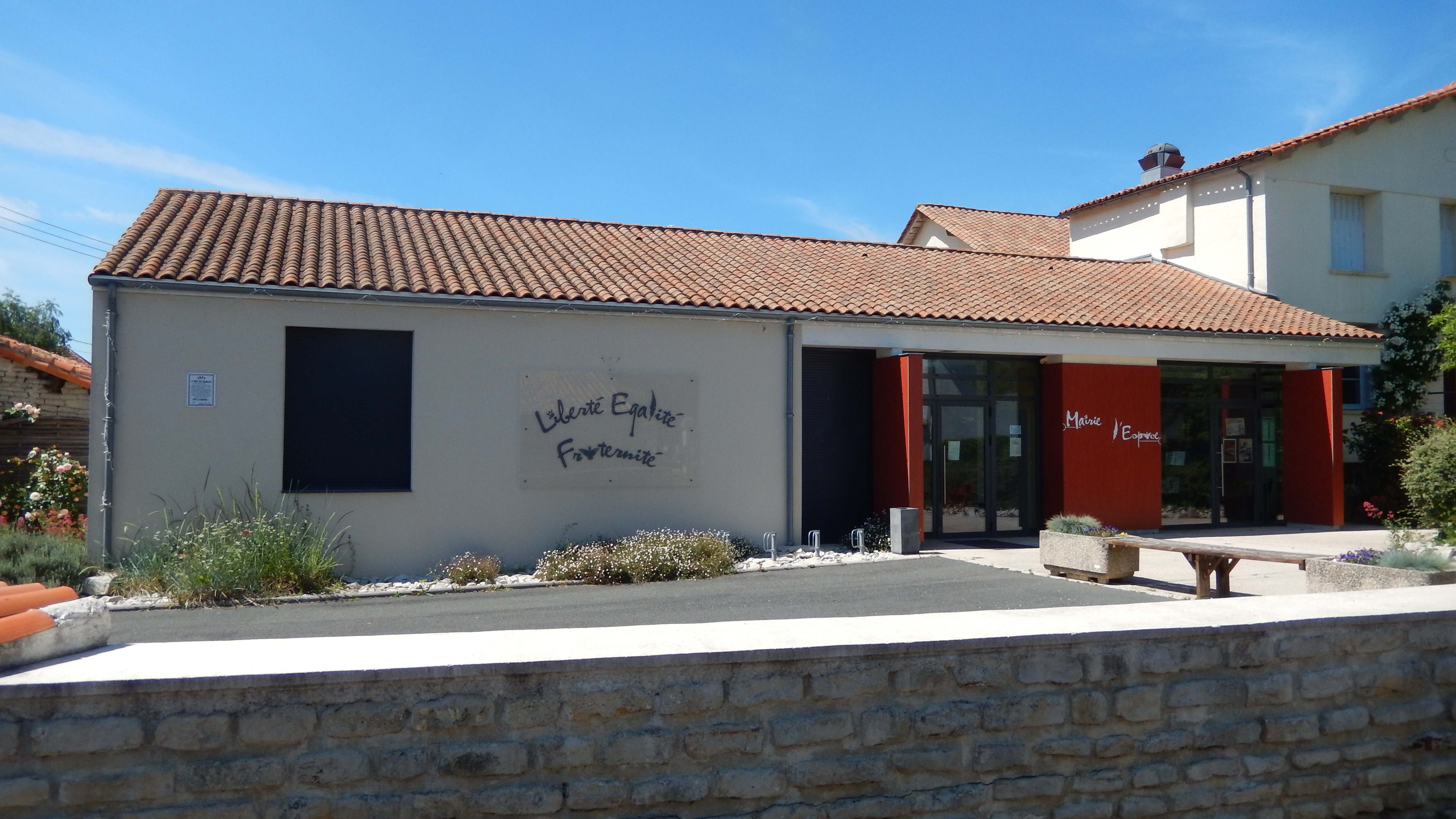 La mairie de la commune de Loubillé, dans les Deux-Sèvres.